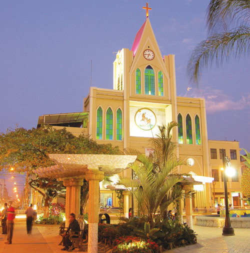 ParqueCentralIglesiaMilagro